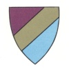 Farben der Studentenverbindung Beveronija zu Riga